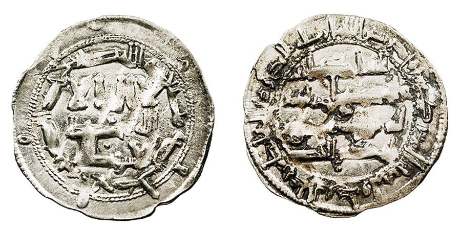 Dírham de Al-Hàkam I, en plata. Encunyada l'any 200 de l'Hègira.